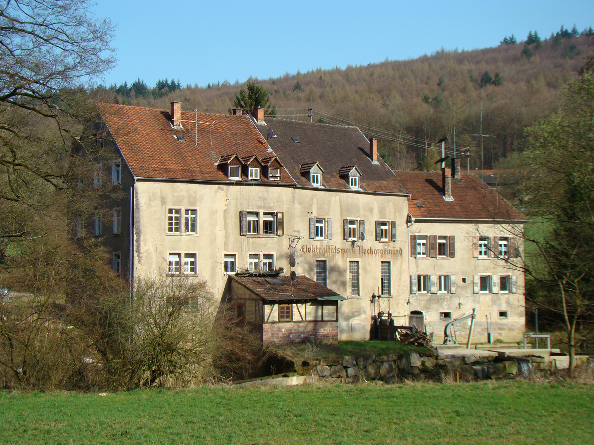 Altes Kraftwerk in Neckargemünd